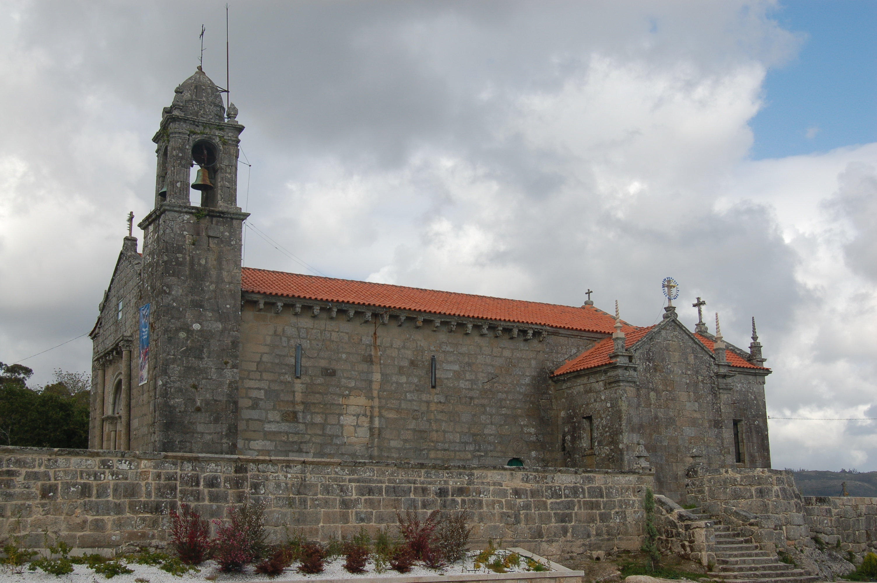 igrexa parroquial de San Martiño de Moaña Categoría:Imaxes de Moaña